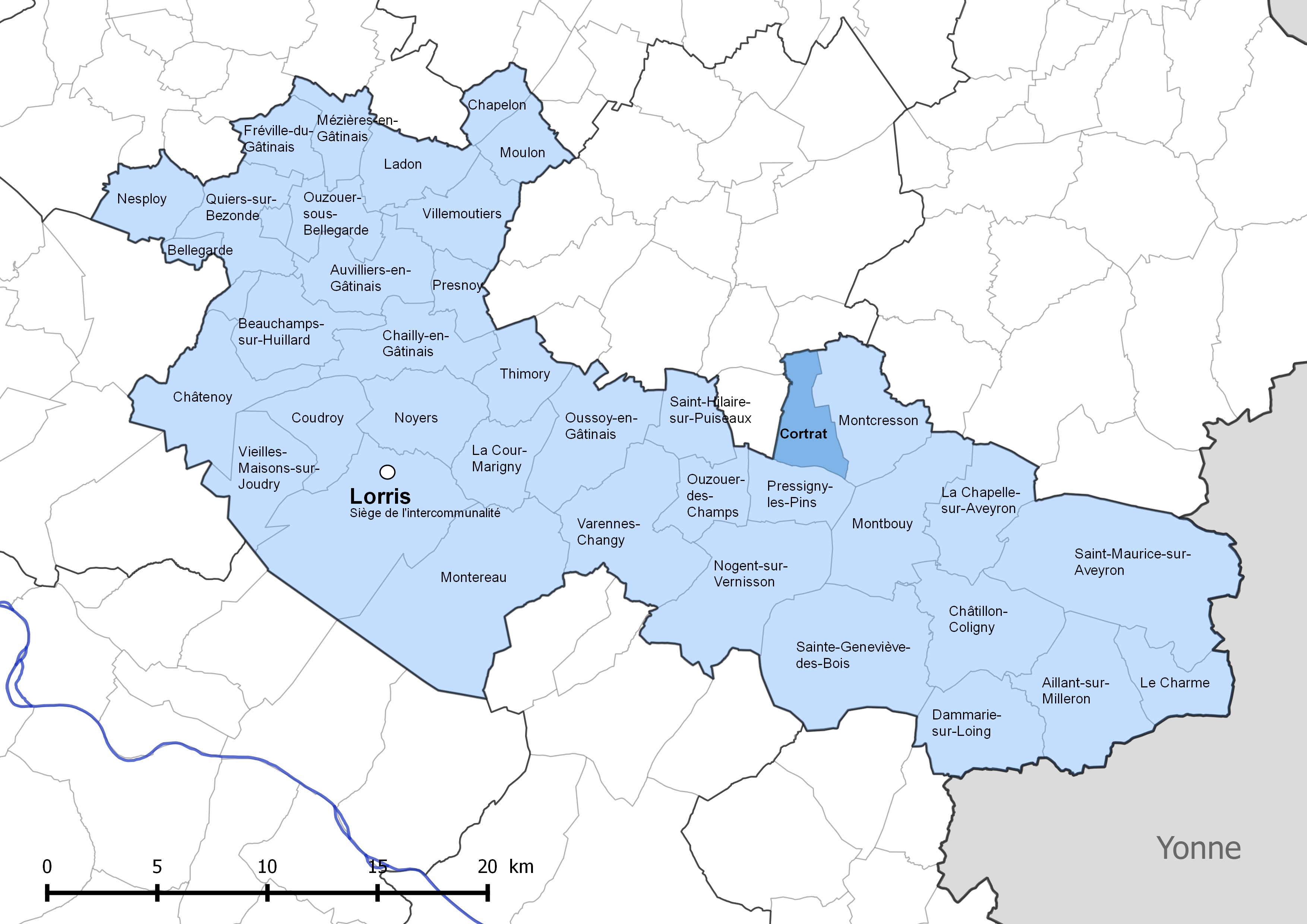 Périmètre de la communauté de communes Canaux et forêts en Gâtinais - Situation de la commune de Cortrat.